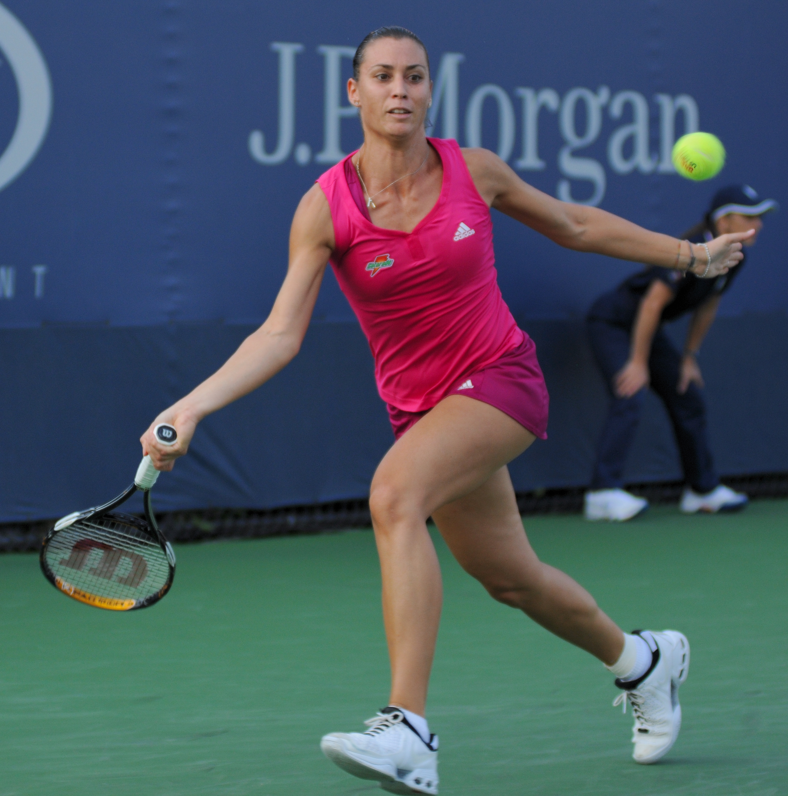 Flavia Penetta - US Open 2010